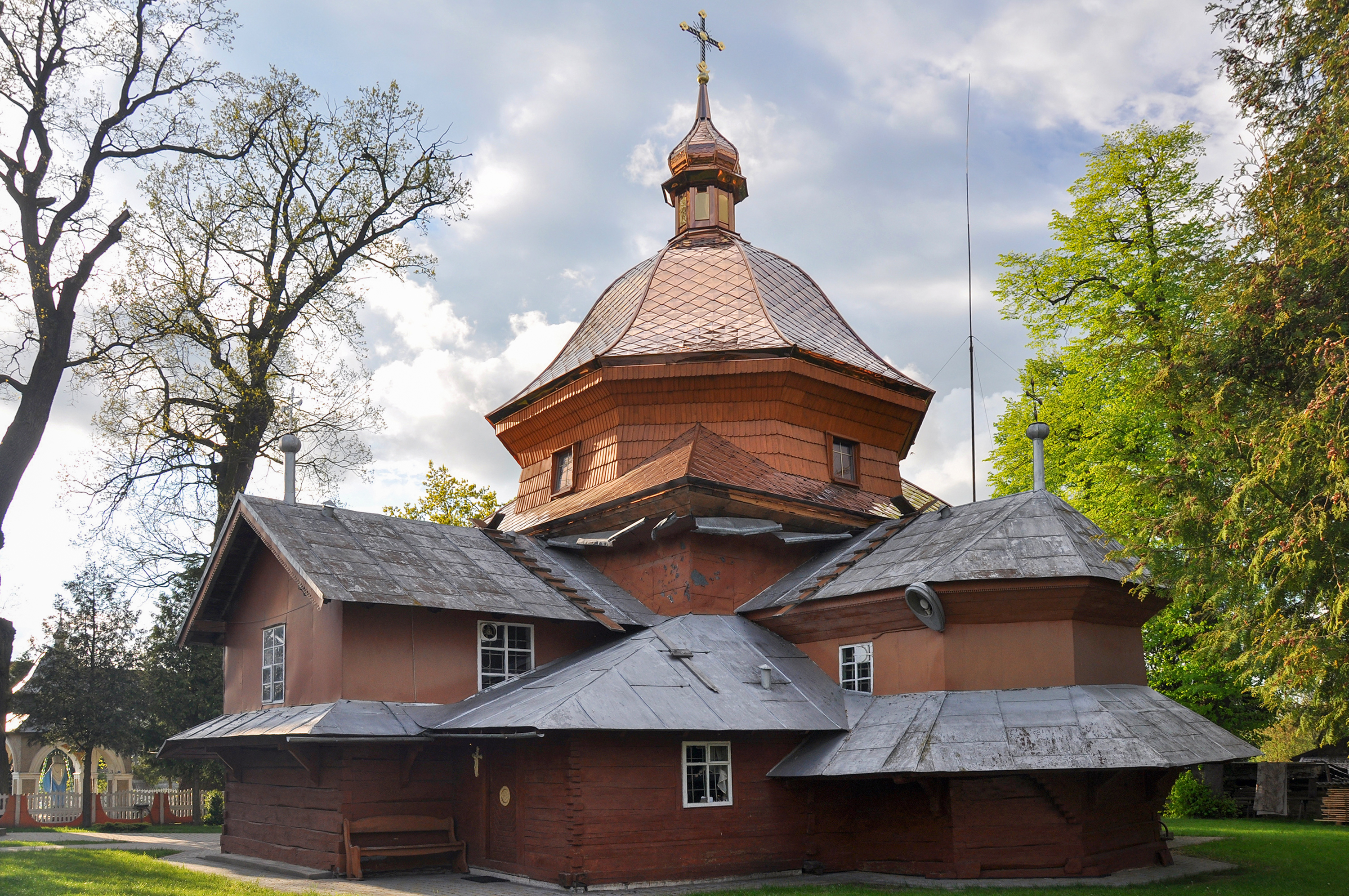 Церква Св.Параскеви (дер.), с.Старий Ярів